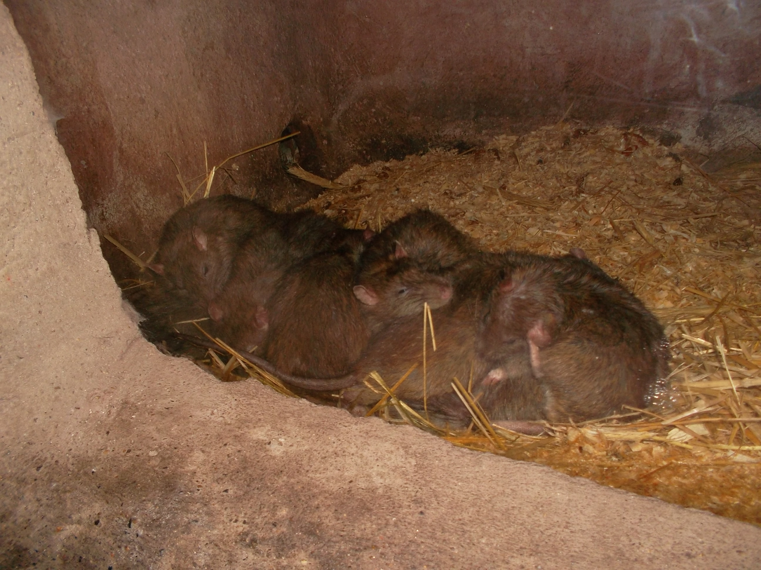 mehrere Wanderratten (Rattus norvegicus)